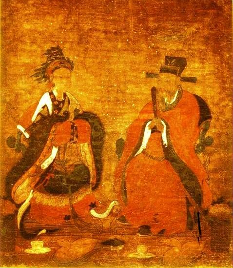 종묘 내 고려 공민왕 내외 영정, 조선 건국후 이태조가 조선건국을 정당화시킬 목적으로 고려 공민왕 내외의 영정을 그려 조선의 종묘에 봉안하였다. 이는 고려는 공민왕에서 끝났다는 의미이기도 하다.